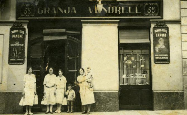 Façana antiga de la Granja Vendrell